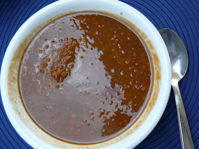 Lenticchie